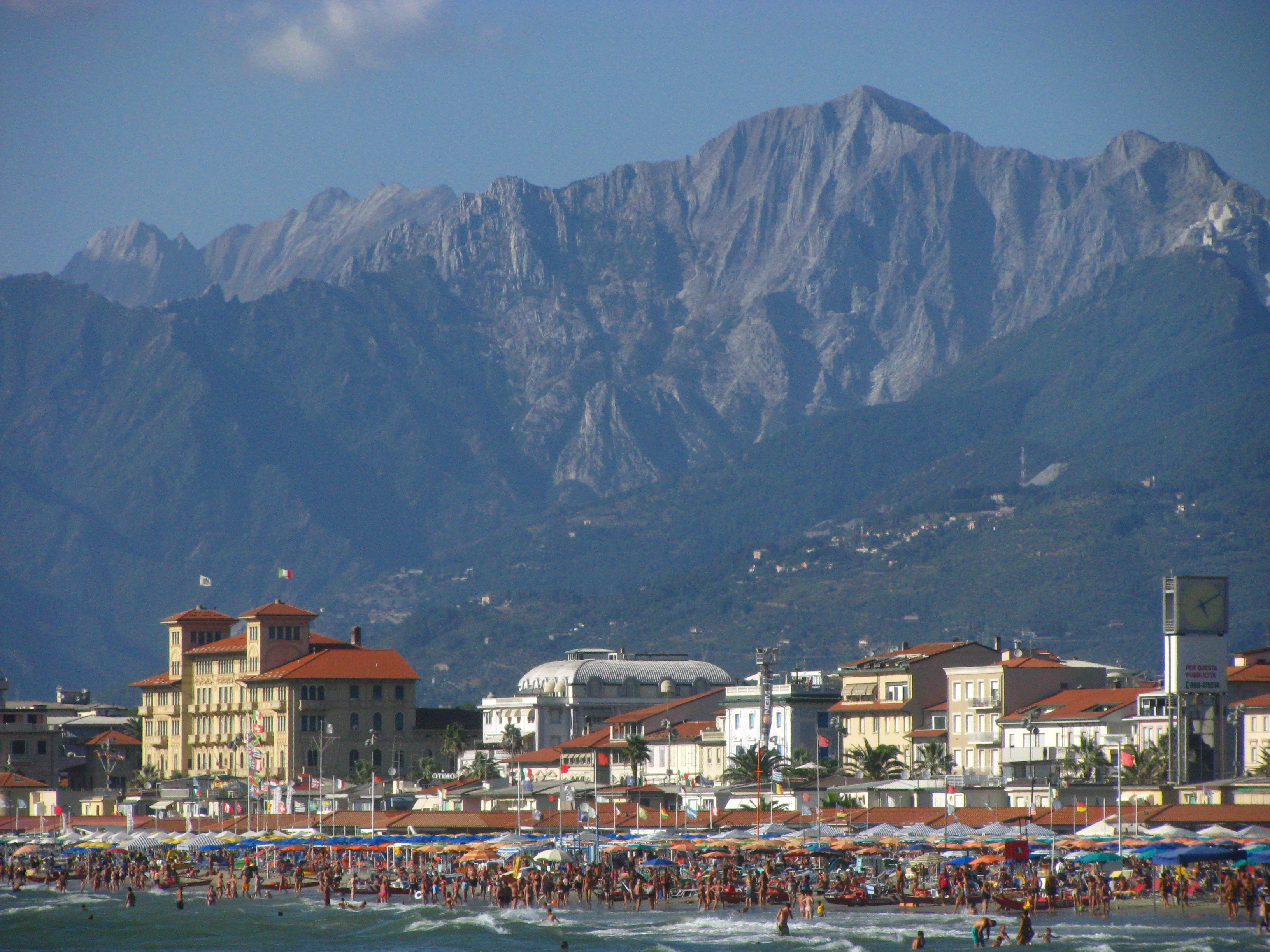 55049 Viareggio, Province of Lucca, Italy